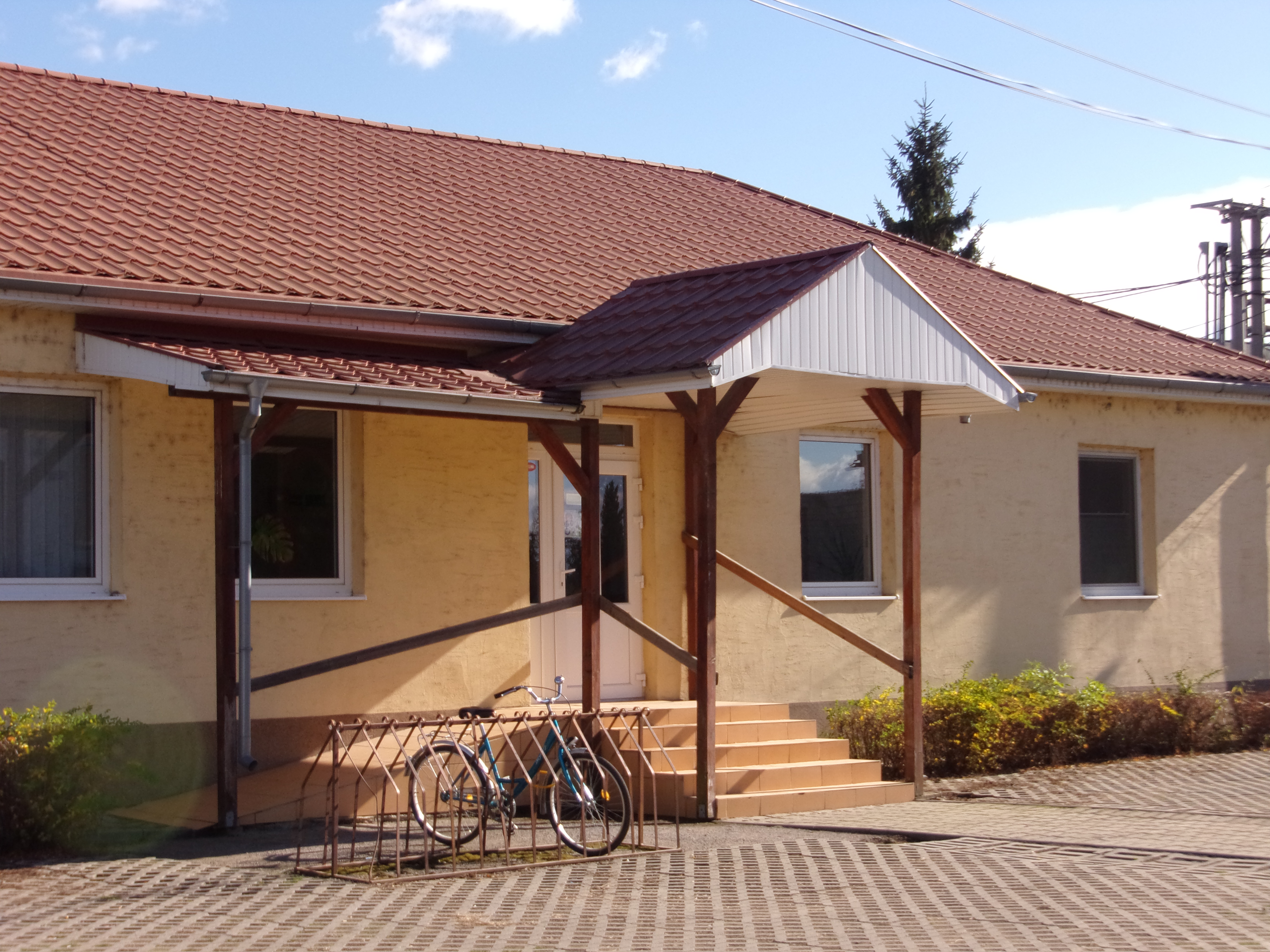 Egészségügyi központ Nagytárkányban